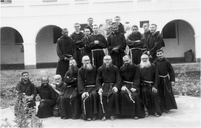 Guaramiranga, Ceará, Brasil. Frei Alberto com os companheiros de noviciado.